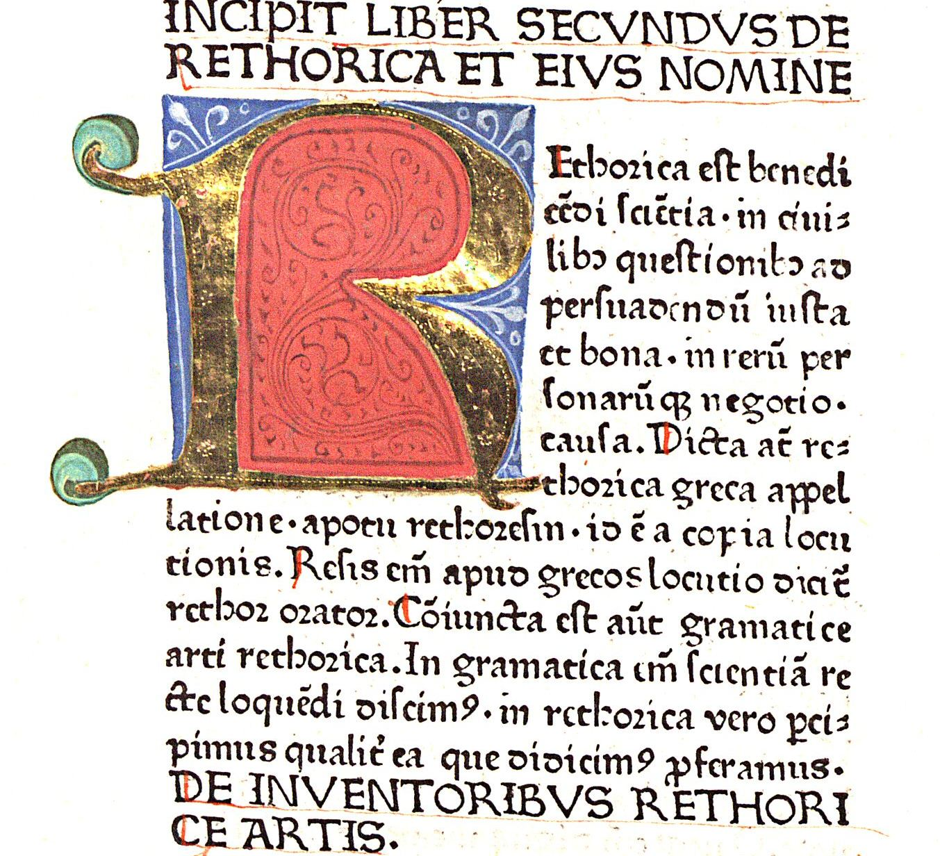 St.Isidor von Sevilla (Isidorus Hispalensis): Etymologiarum libb.XX. Straßburg. Die Etymologiae des Isidors enthalten den ältesten Kartendruck des Abendlandes; dabei handelt es sich um eine Karte der westlichen Halbkugel, die noch im T-O -Stil als Mönchskarte ausgeführt ist. Isidor wurde 2001 zum Patron des Internets benannt.